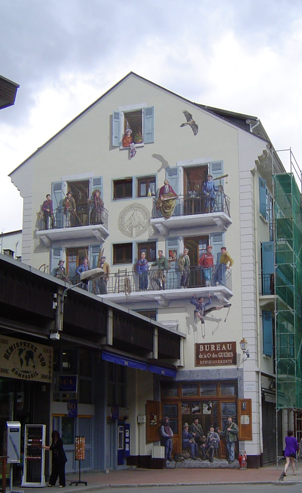 Photo prise à Chamonix-Mont-Blanc (France)